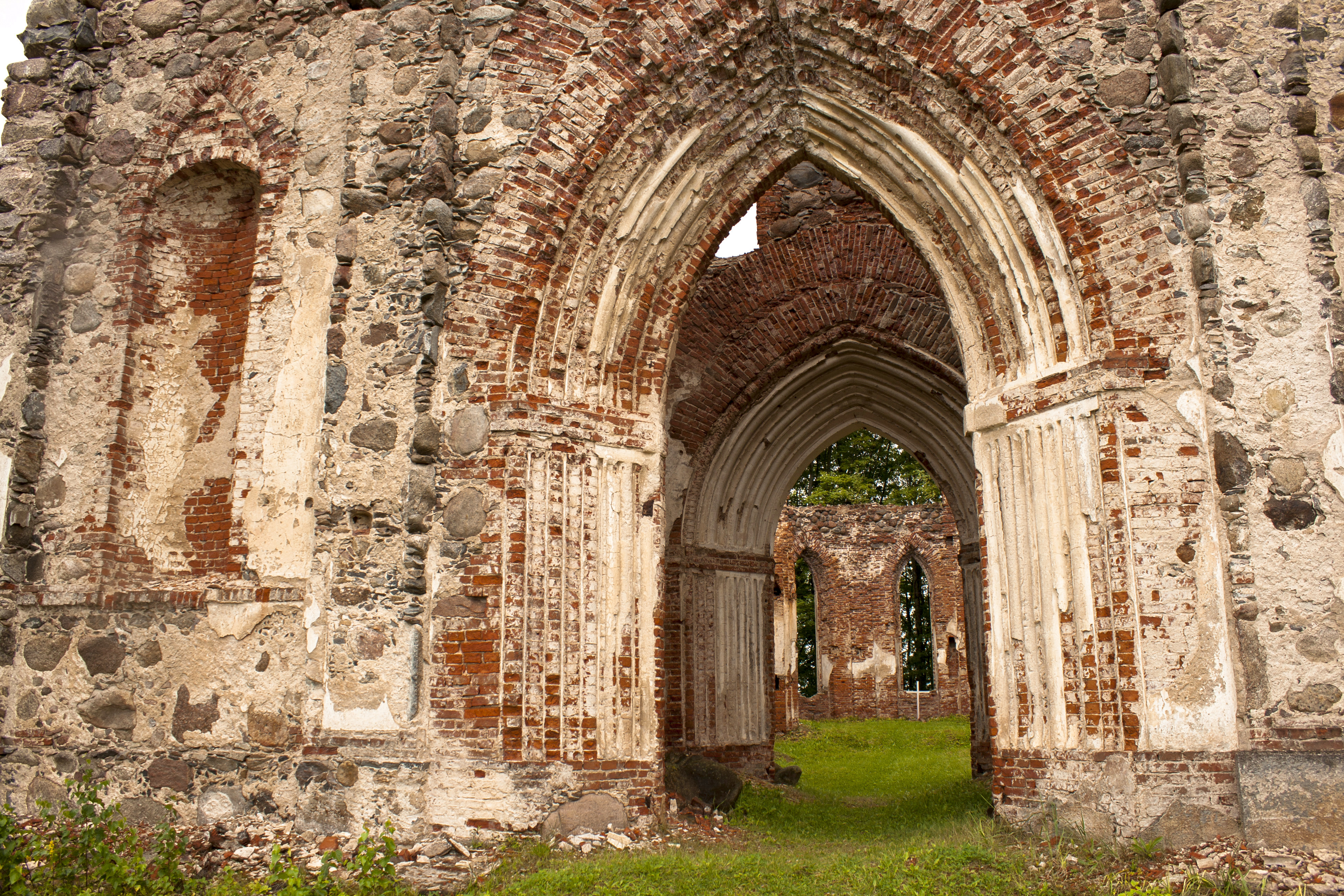 Veckalsnavas baznīca / church ruins